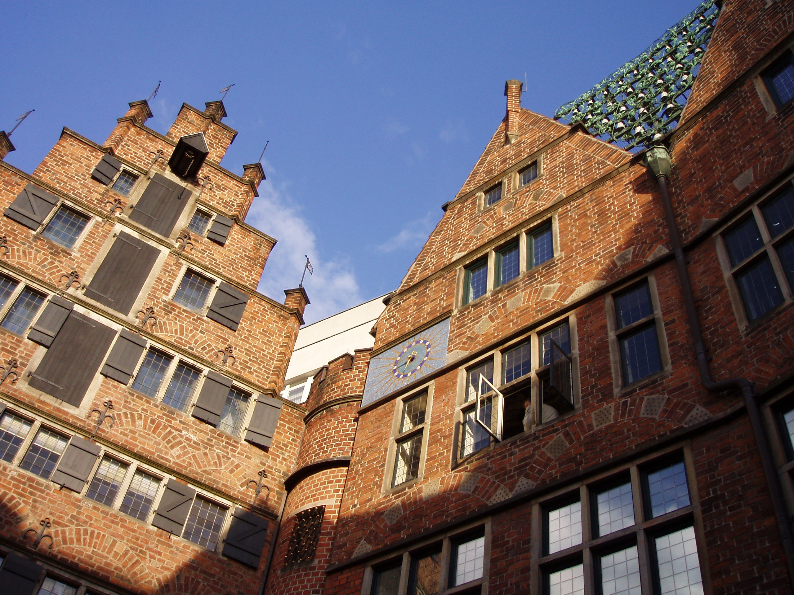 Böttcherstraße Bremen